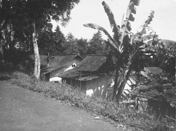 Foto. Leles, West-Java, dorpsgezicht